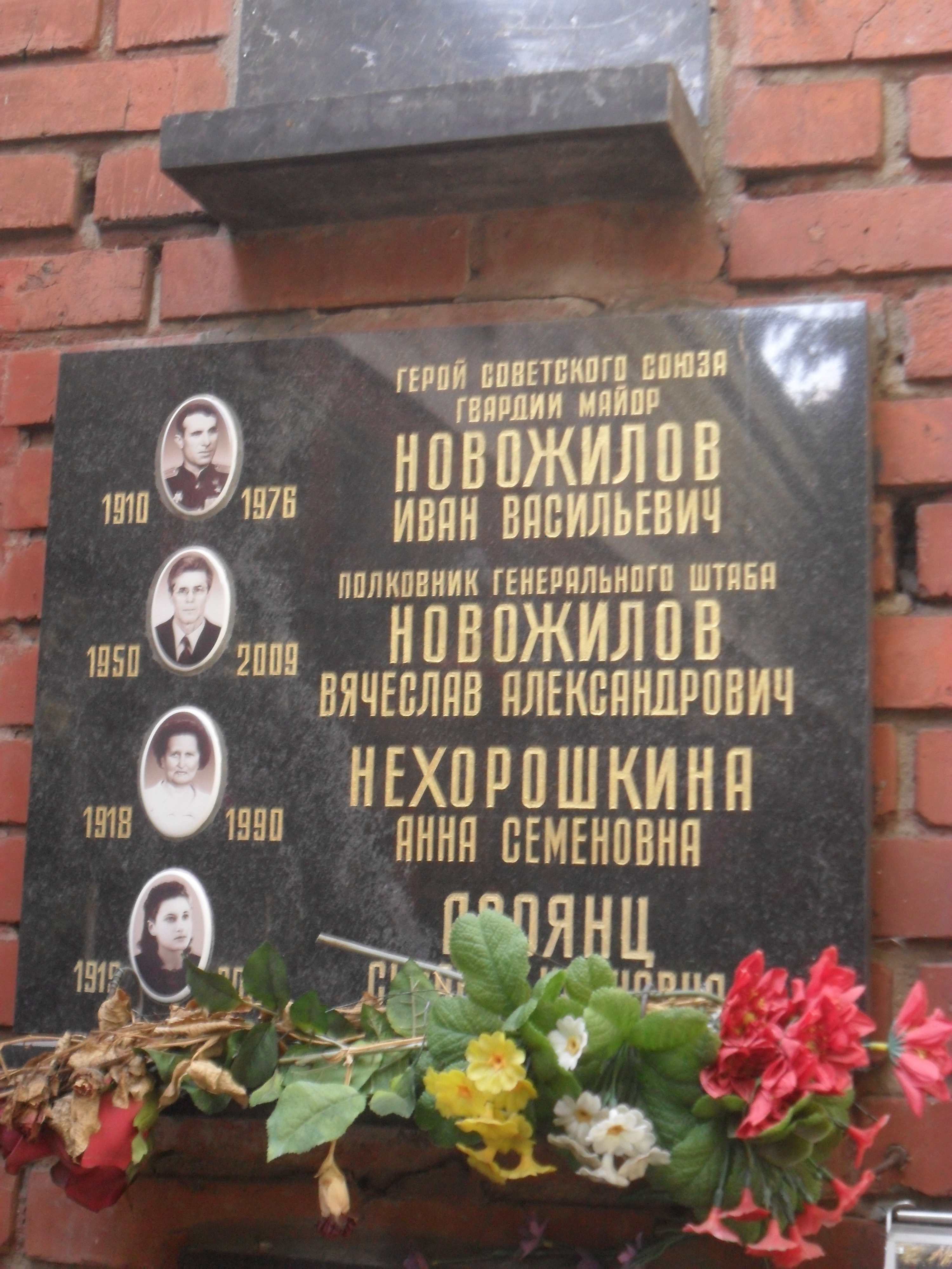 Плита колумбария Героя Советского Союза Ивана Новожилова на Новодевичьем кладбище Москвы.